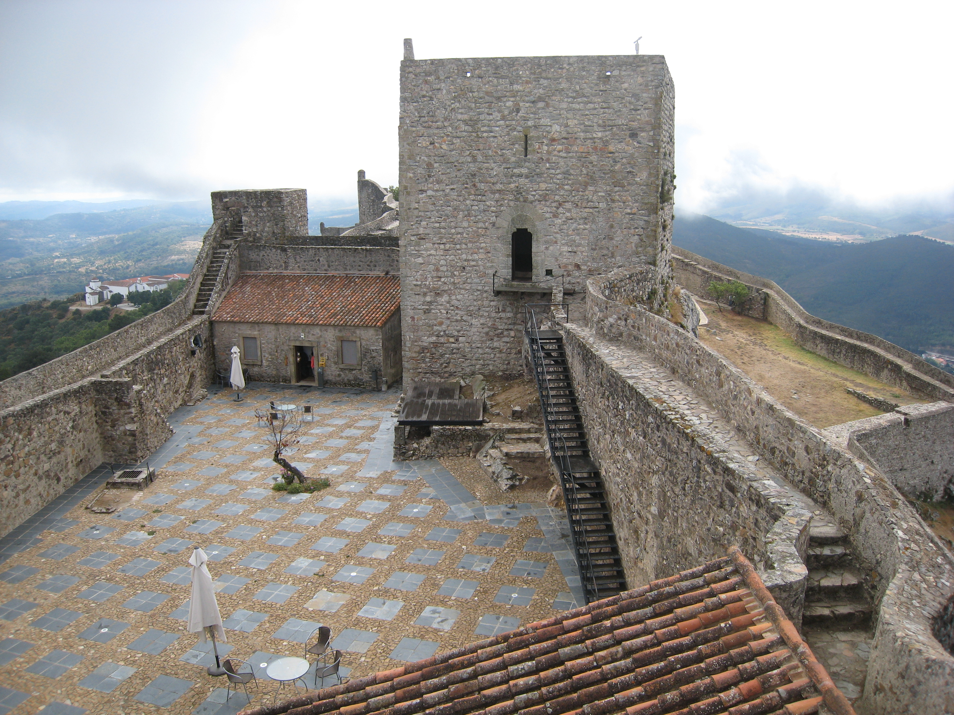 Castelo de Marvão, Marvão, Portugal.